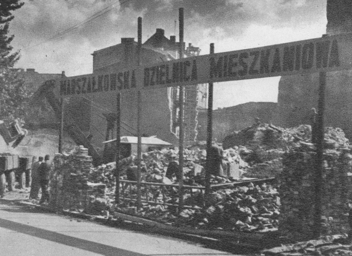 Rozpoczęcie budowy MDM w Warszawie w sierpniu 1950